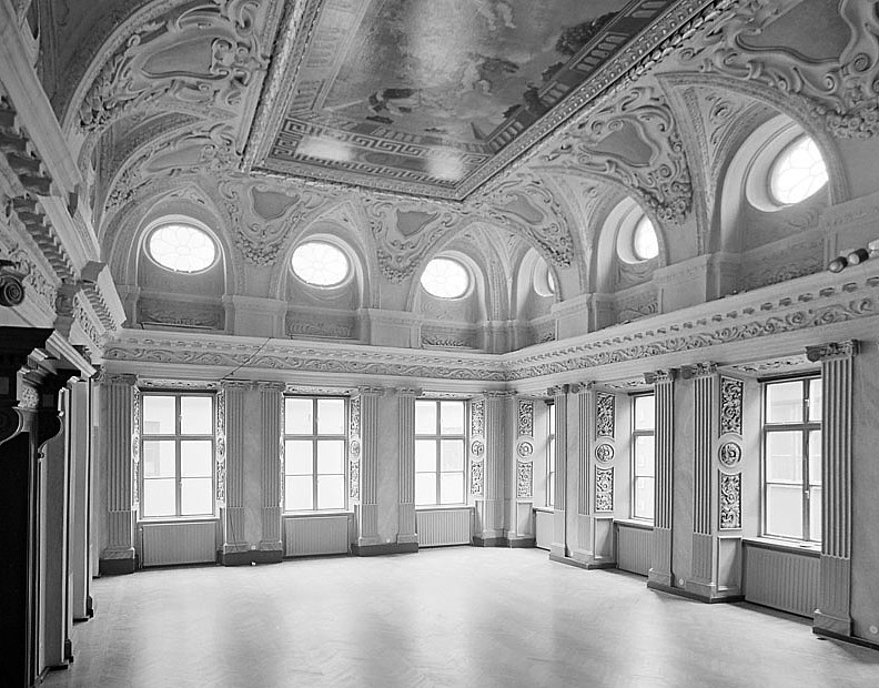 Stora Nygatan 30. Schönfeldska salen